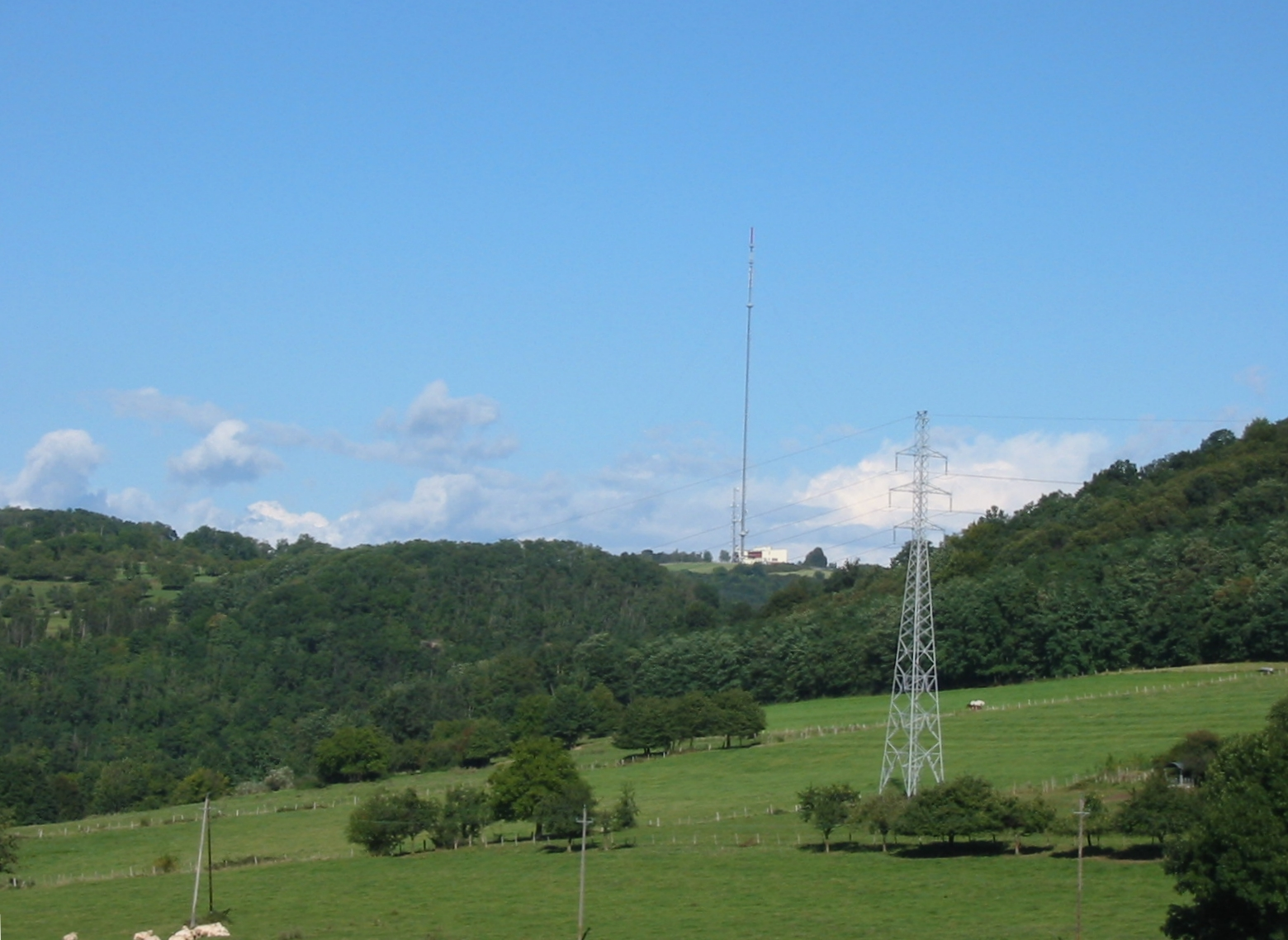 L'émetteur TV de Nordheim-Strasbourg, dit de Strasbourg, Bas-Rhin (67)